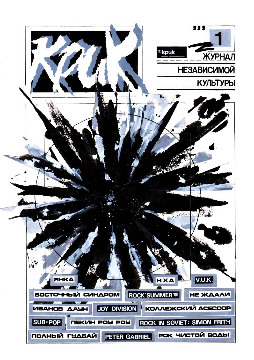 Обложка журнала "КРИК", издаваемого Игорем Вагановым